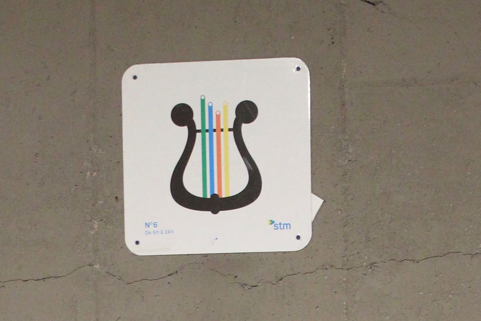 Lyre No 6 du métro de Montréal, station Berri-UQAM